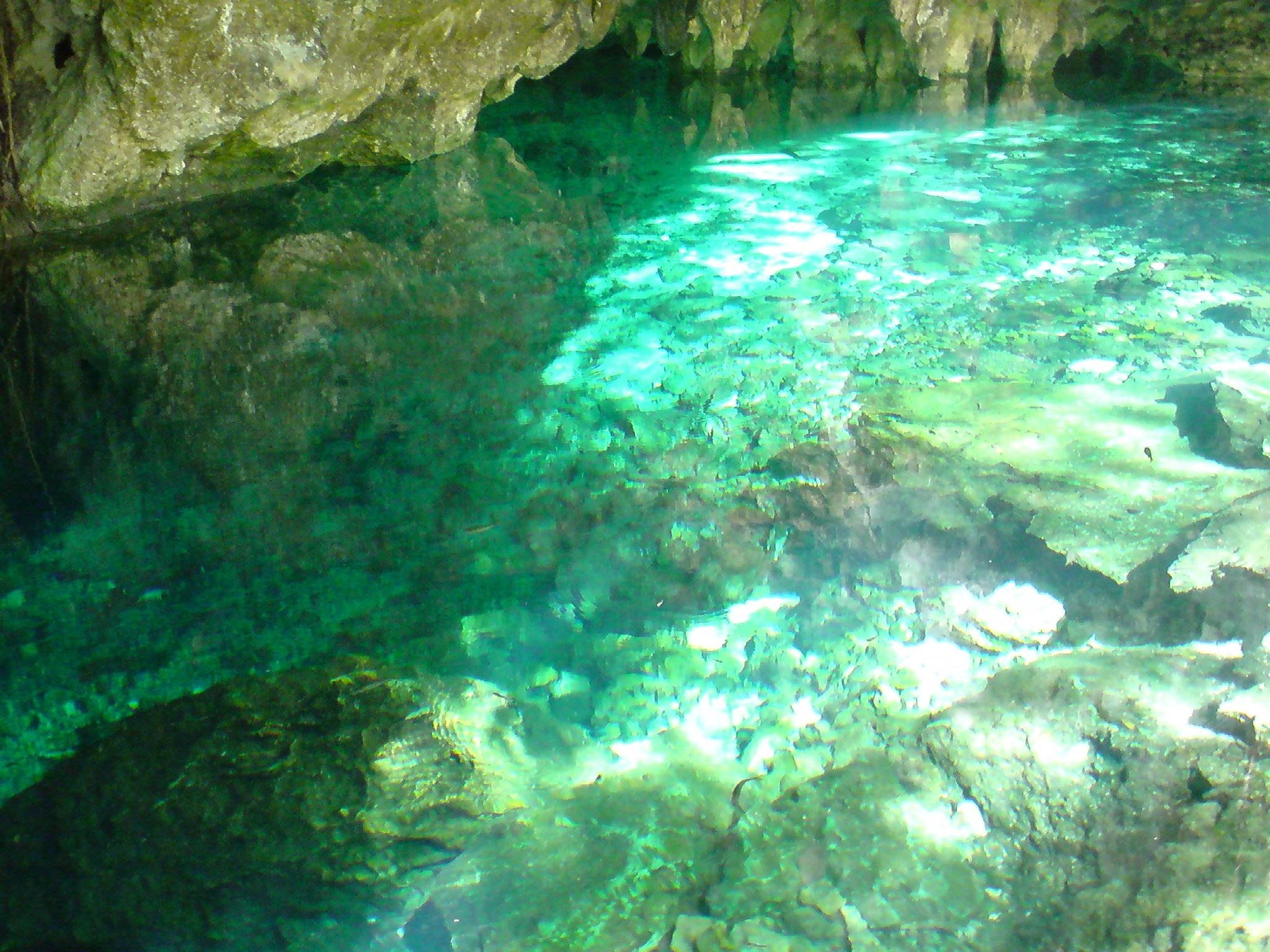 Cenote, Mexico